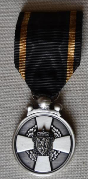 Норвежская медаль Полиции "За международную службу"